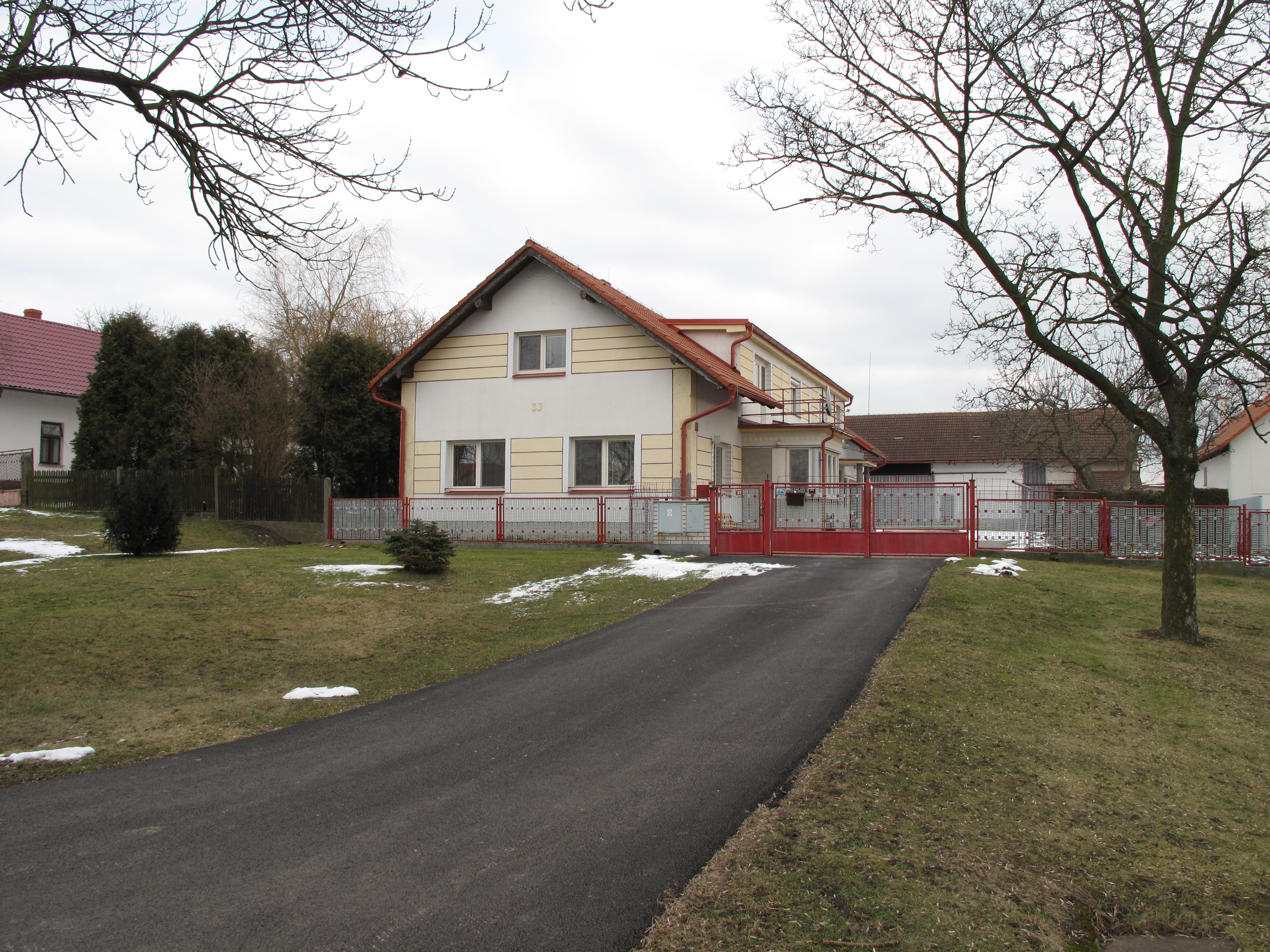 Chalupa v Kobylnici. Okres Mladá Boleslav, Česká republika.